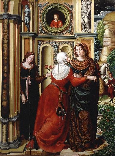 La obra representa a la Virgen María, que estaba embarazada del Niño Jesús, visitando a su prima Santa Isabel, que lo estaba a su vez de Juan el Bautista.